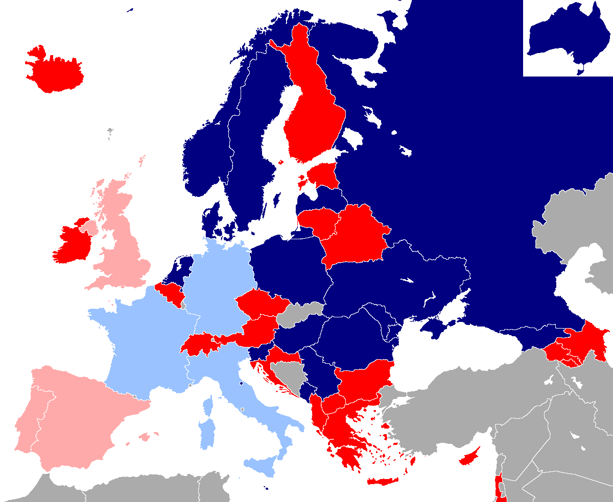 Ucesnici ESC 2018 po polufinalima